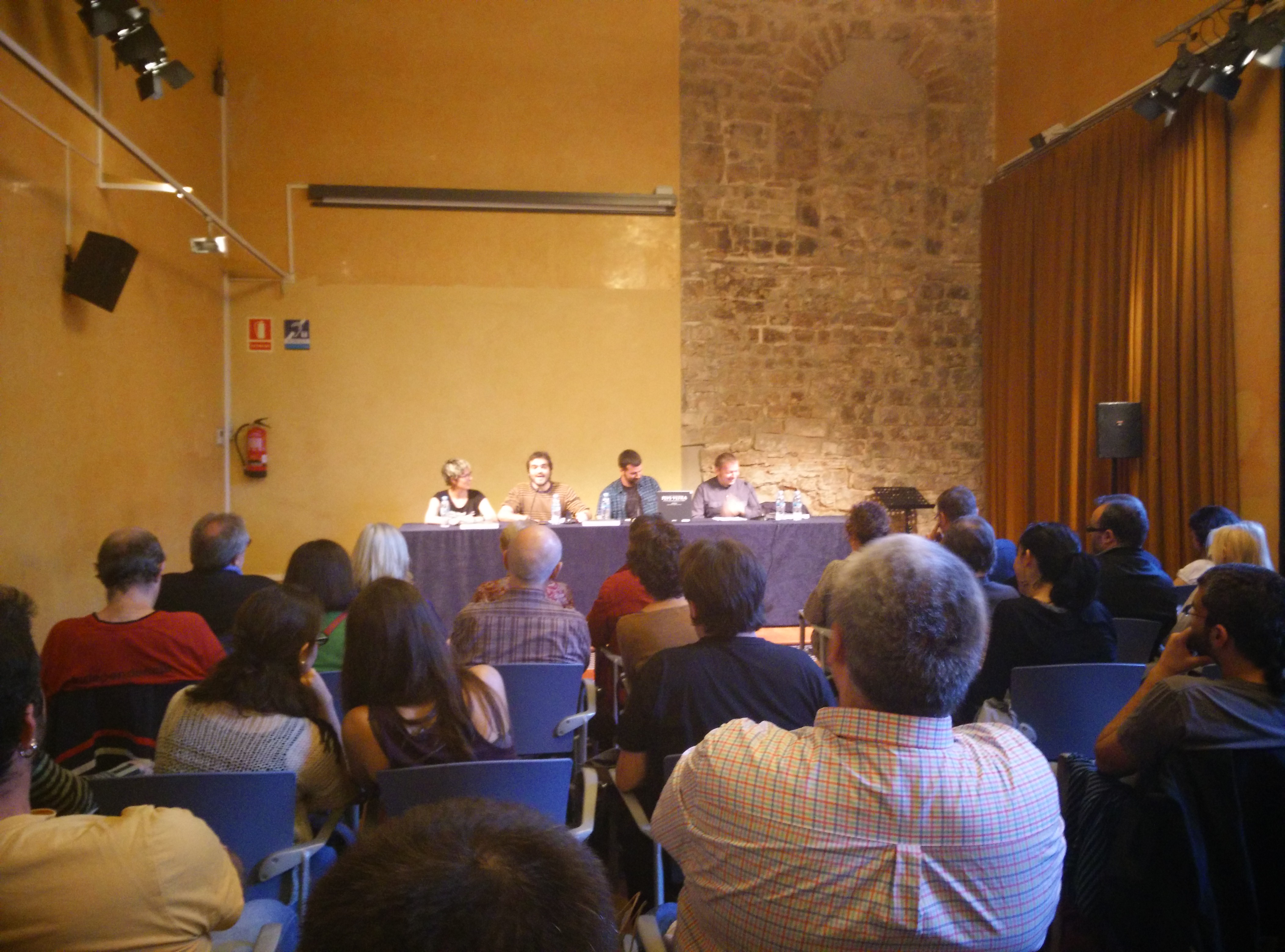 Presentació Plvs Vltra Jordi Borràs al Pati Llimona de Barcleona (22 abril 2015)